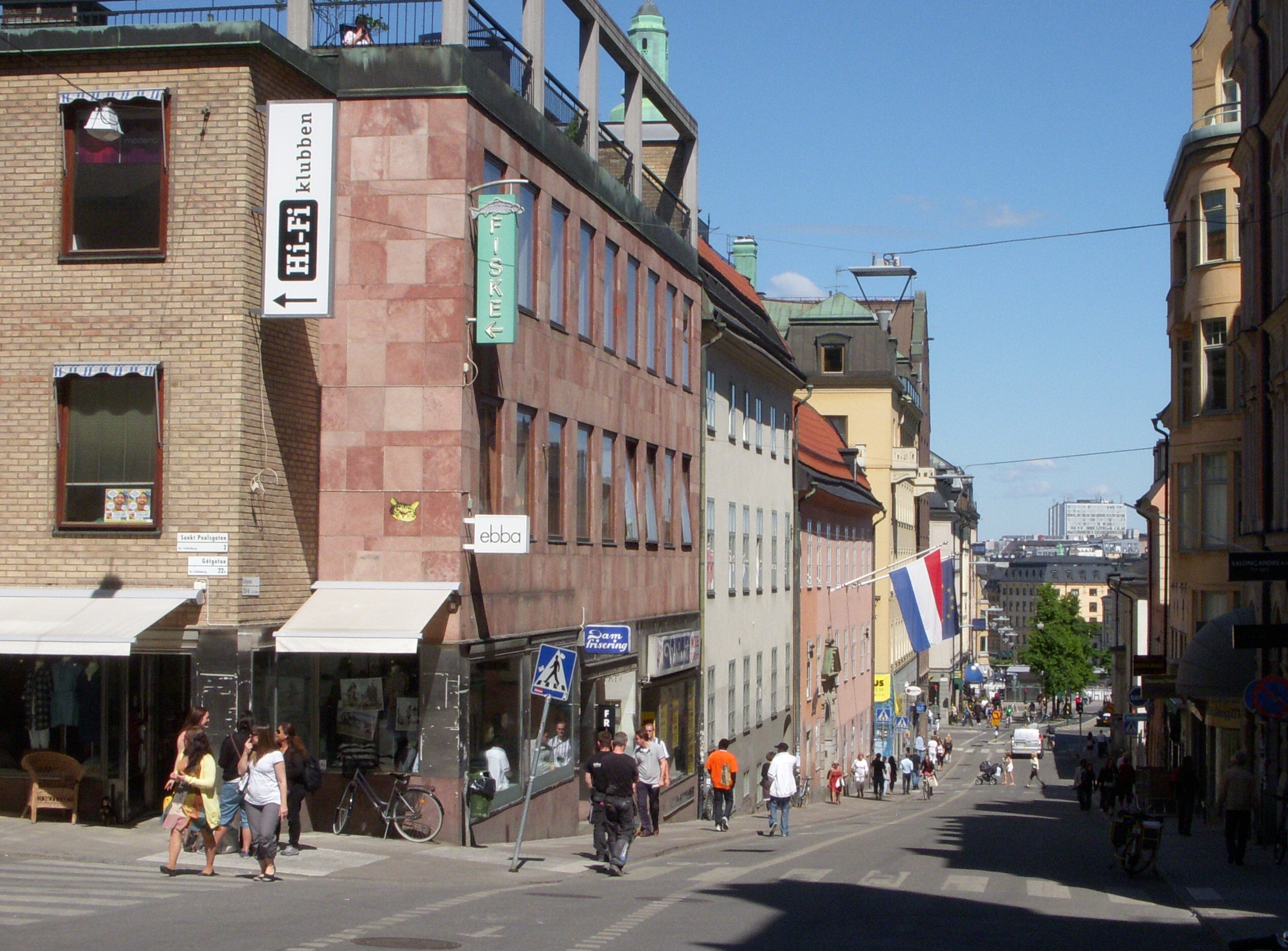 Götgatan (Götgatsbacken) norrut